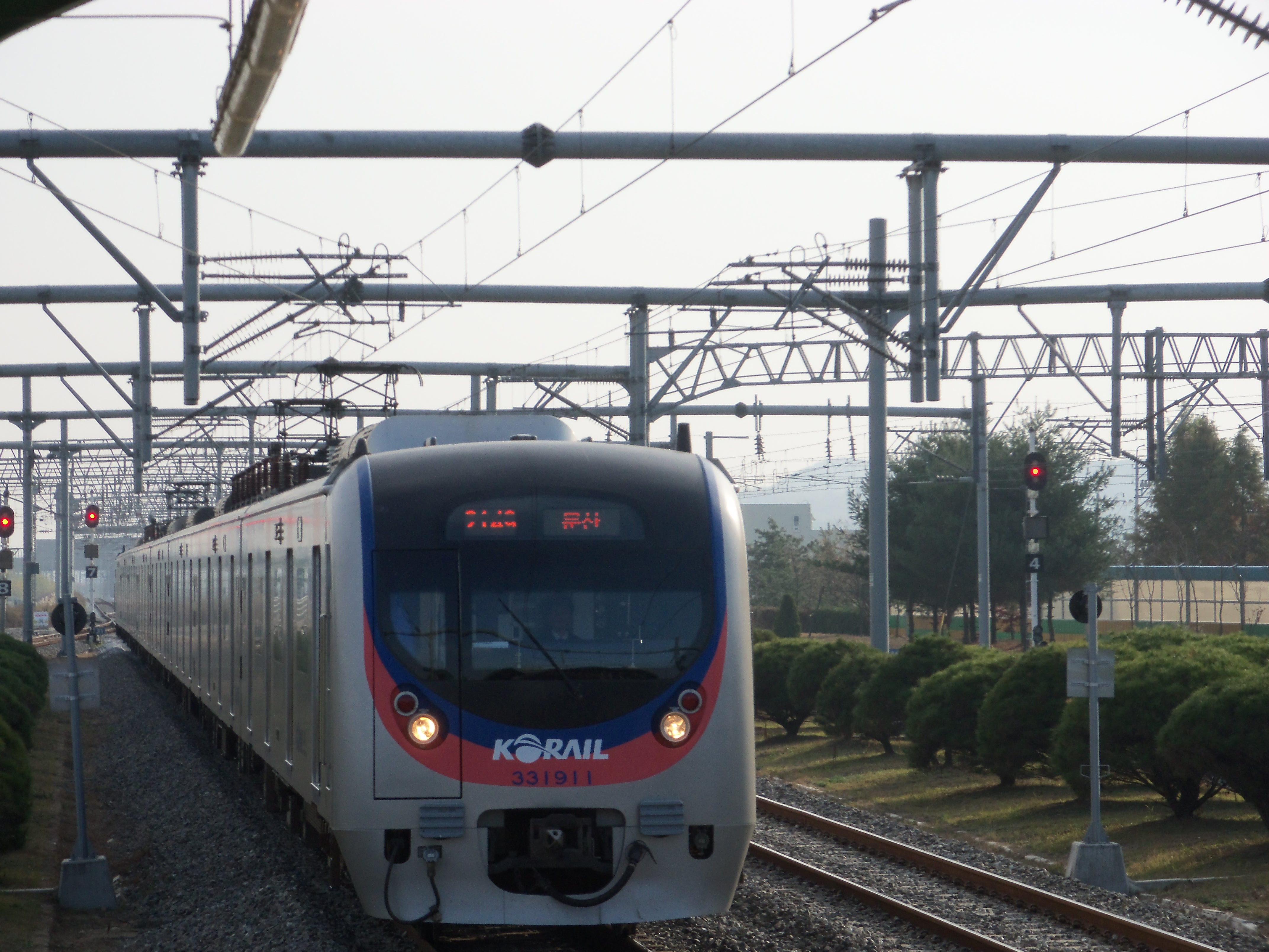 문산역 진입중인 33111편성